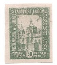 Любомльські_марки_-_50.jpg: марка, номіналом 50